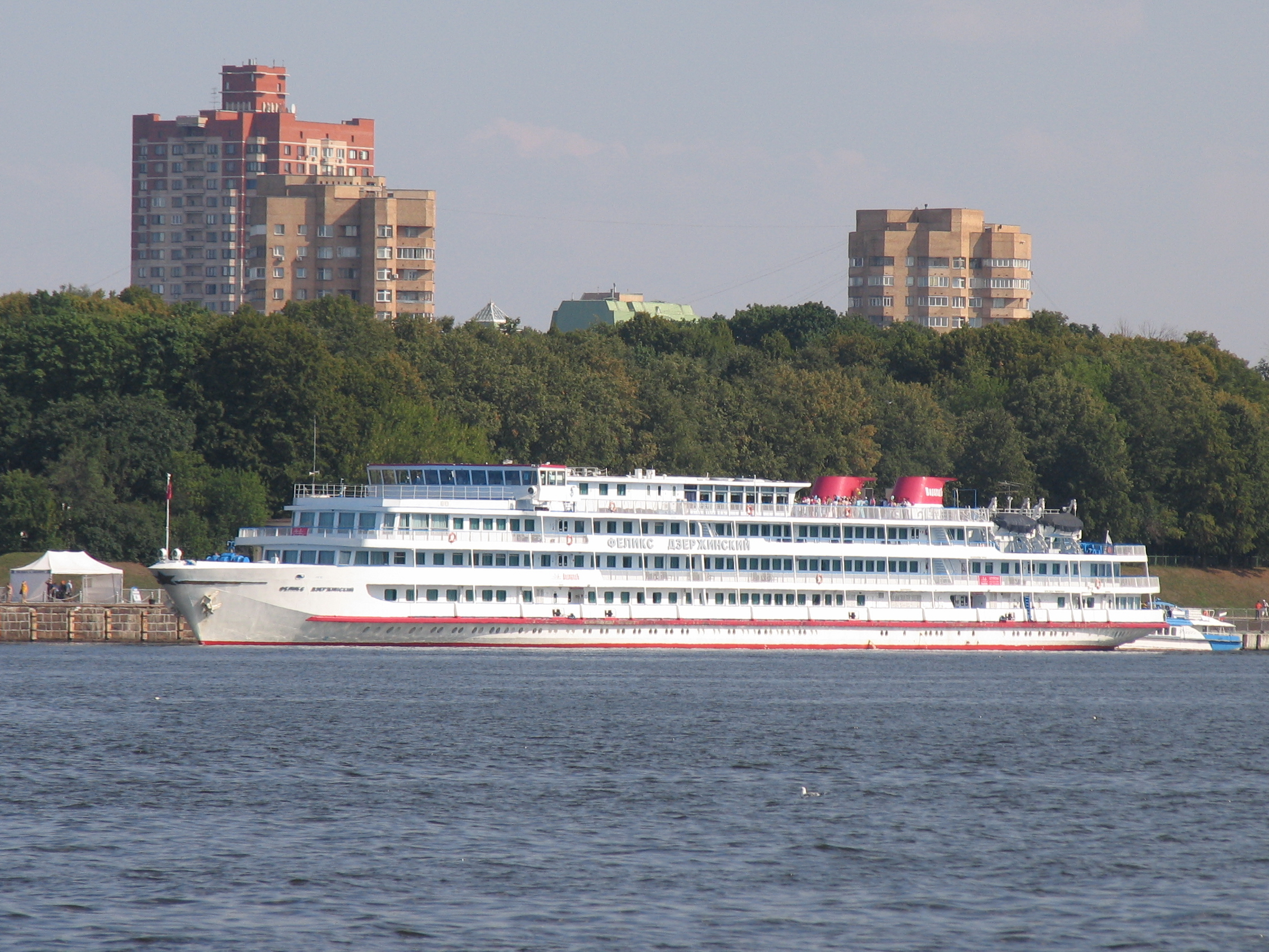 Теплоход "Феликс Дзержинский" отходит от Северного речного вокзала.